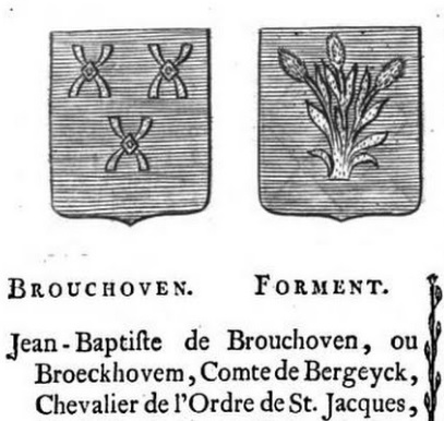 Wapenschild van de Weduwe Rubens/ Dowager Rubens: Helena Fourment, Countess de Bergeyck